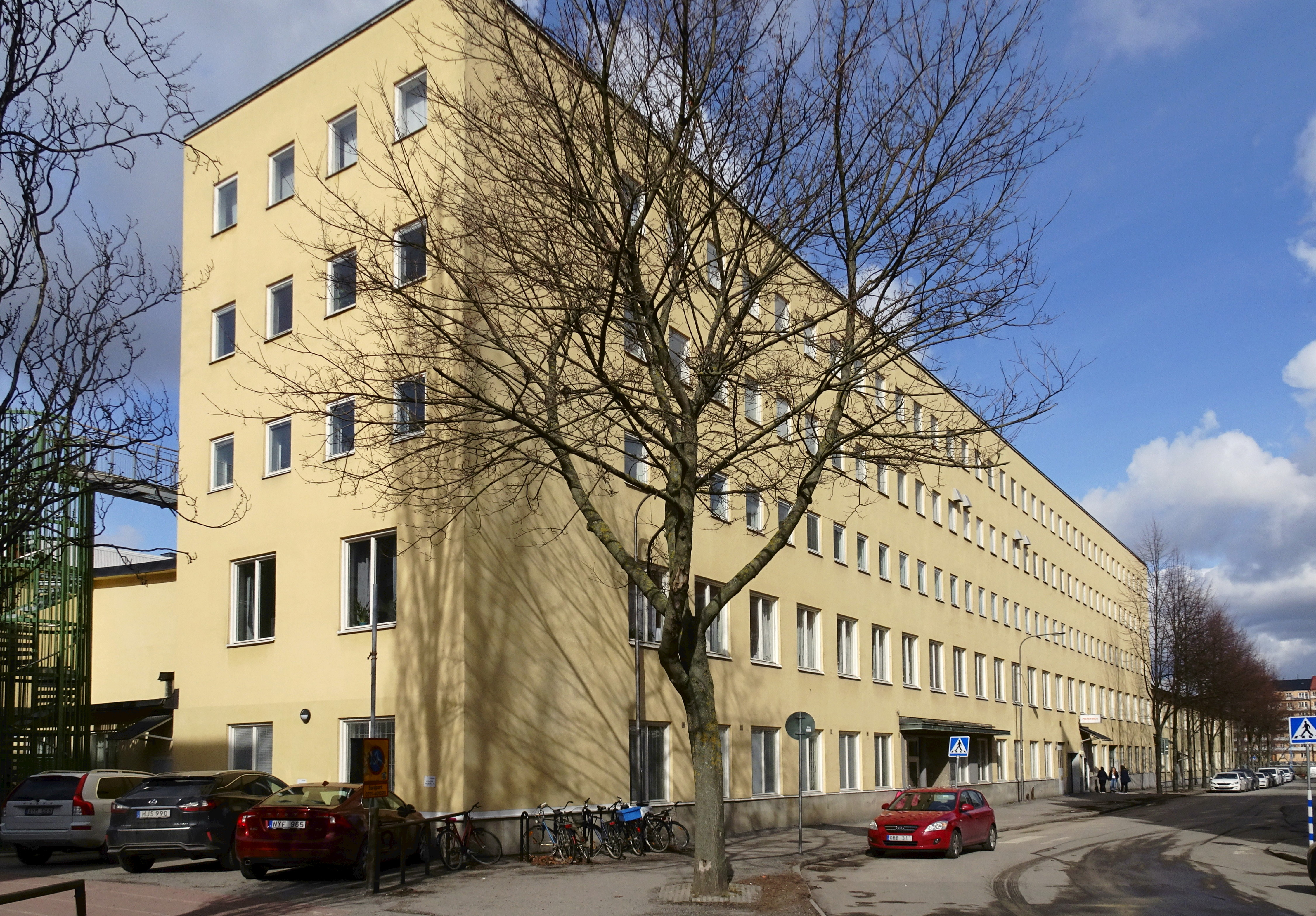 Fastigheten Tryckeriet 13, Strängbetongs gamla fabrik på .Liljeholmen, arkitekt Axel Eriksson (1942) om- och påbyggnad (1961) arkitekt Gustaf Lettsröm.